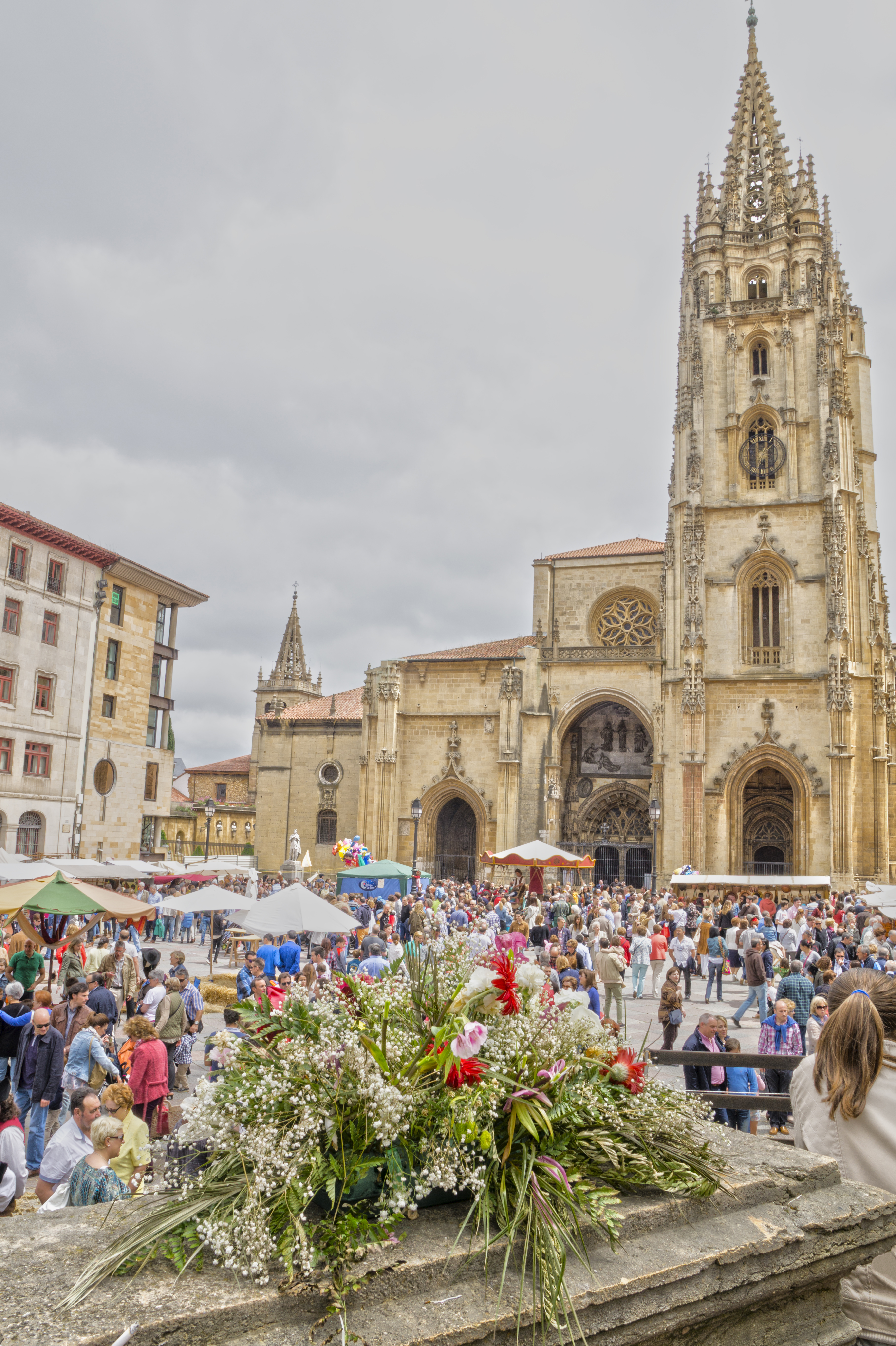 Feria de la Ascensión This is a photography of a Folklore festival in Spain (Wikidata id Q5858861).